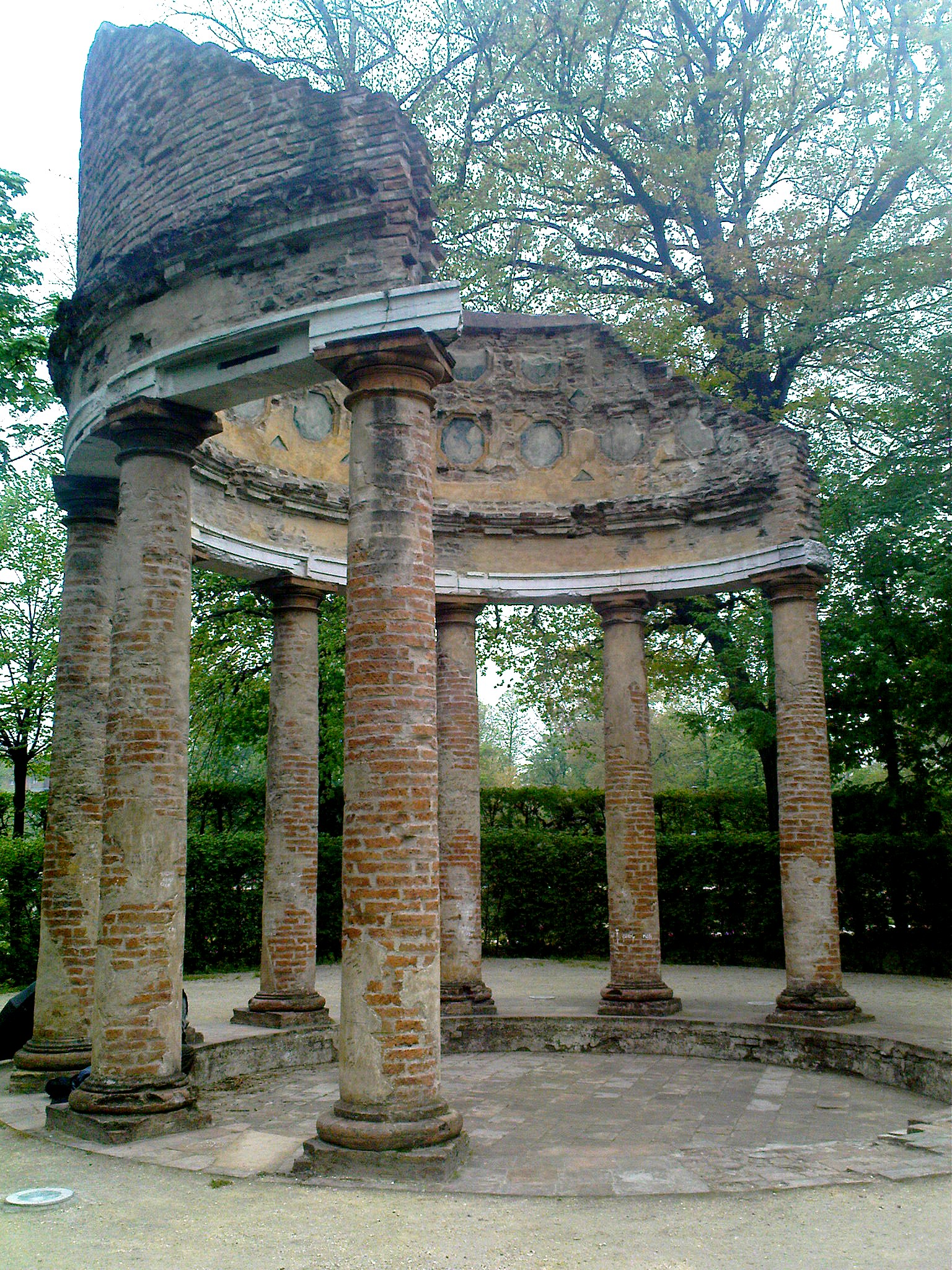 Tempietto d'Arcadia (1769) a Parma.